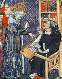 Louis IX et Vincent de Beauvais